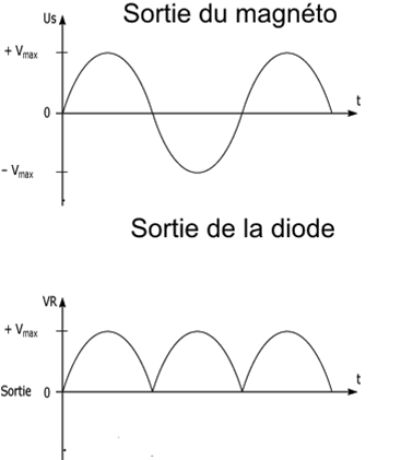 courant redresser